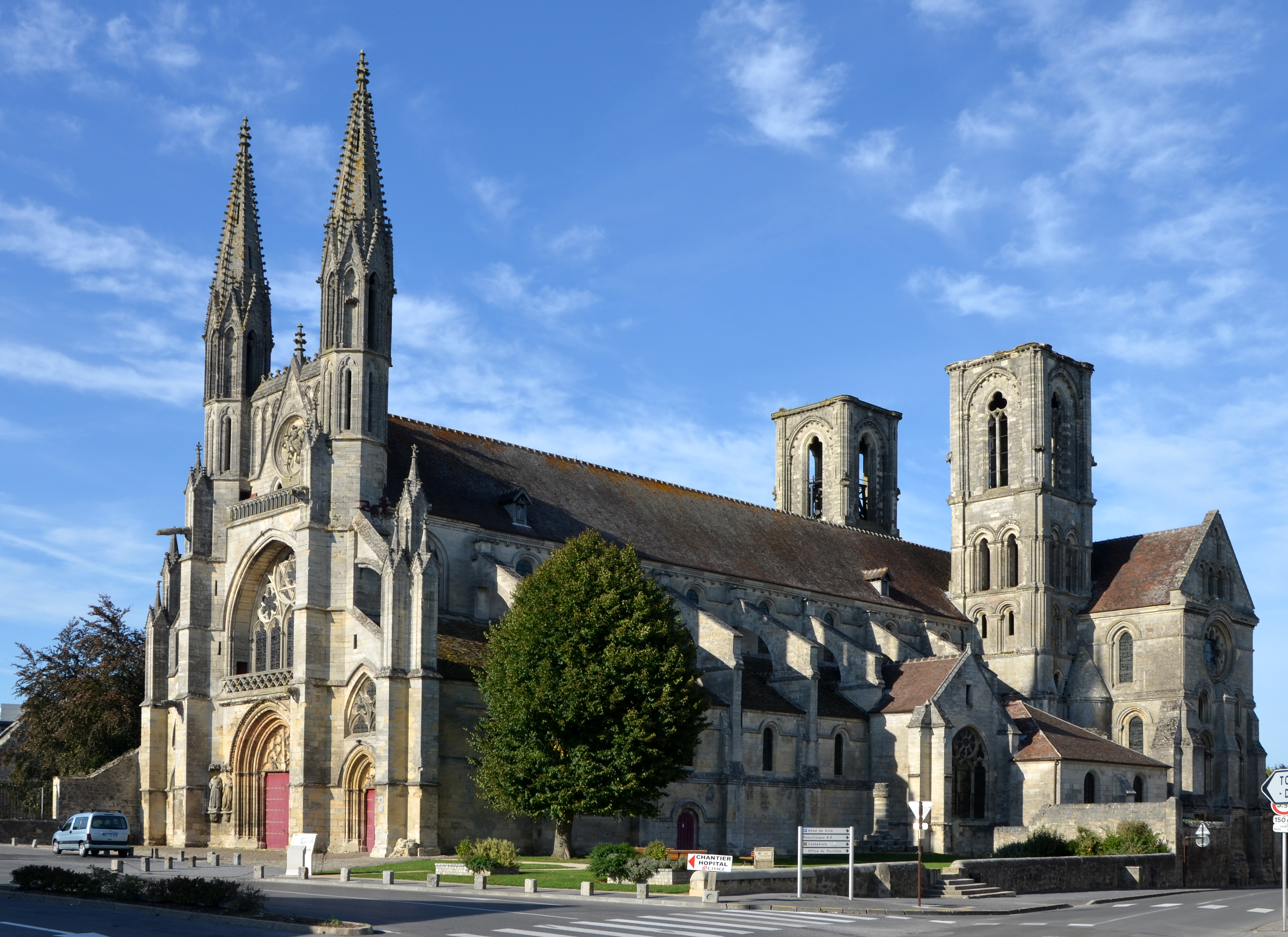 Eglise Saint-Martin, Laon, Aisne, France